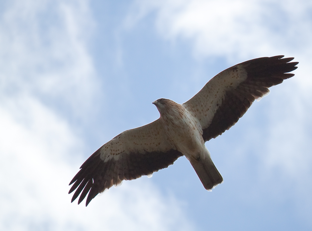 Zwergadler (Booted eagle)Helle Morphe ,aufgenommen in Mallorca 10/09